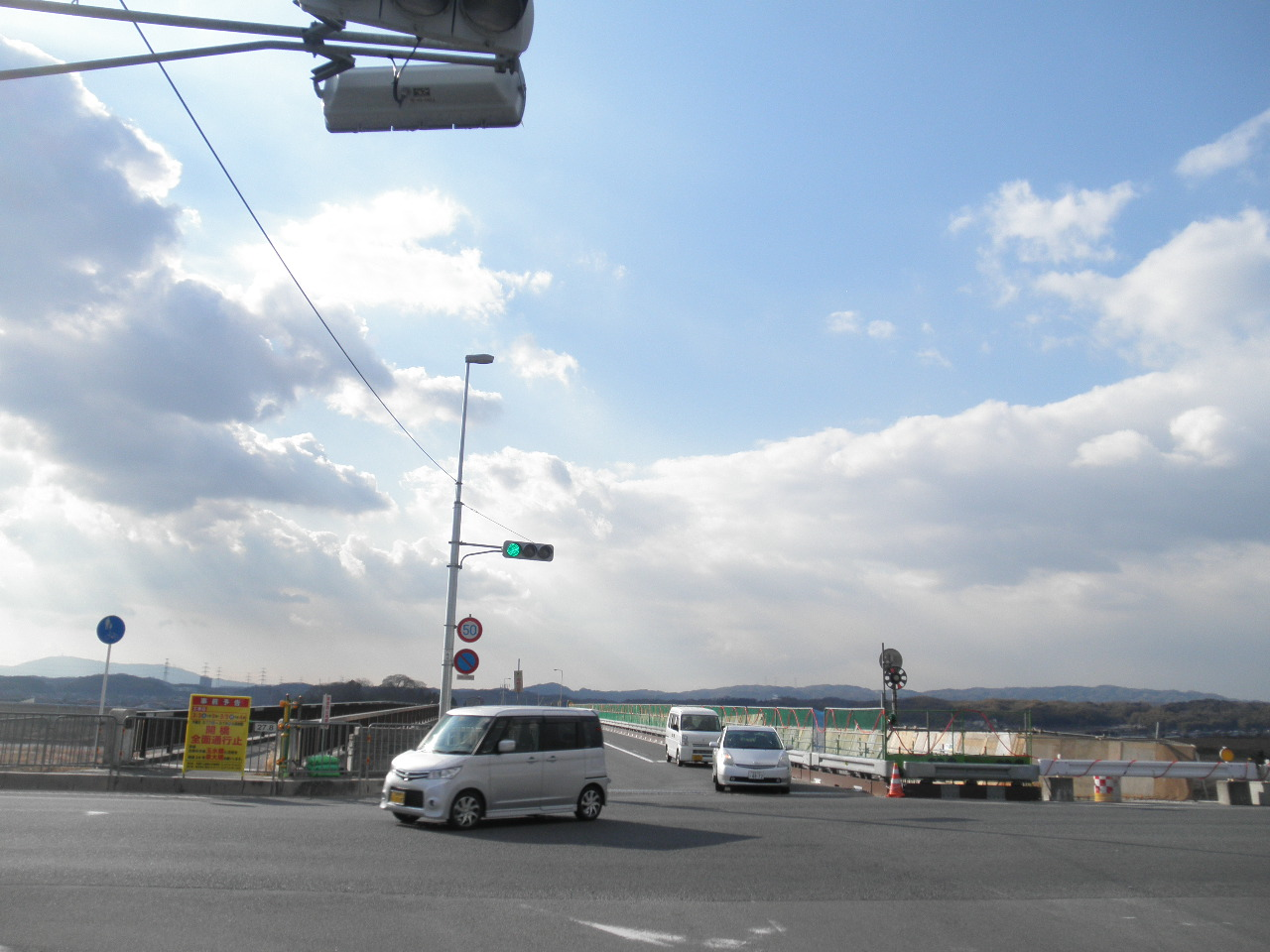 開橋 木津川市側